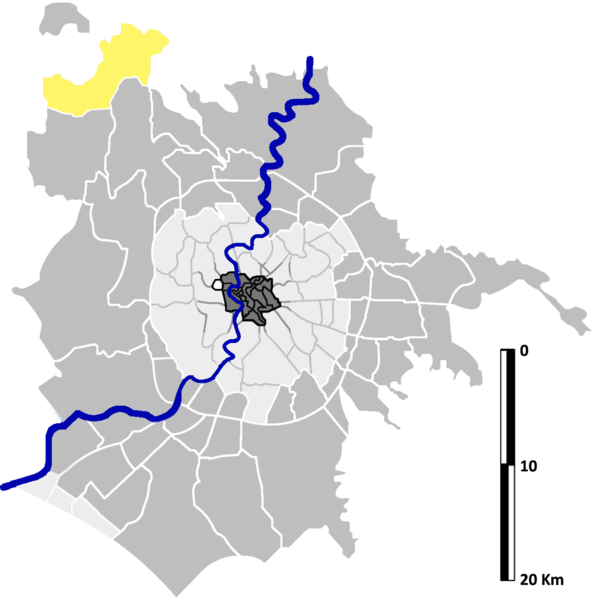 Cesano